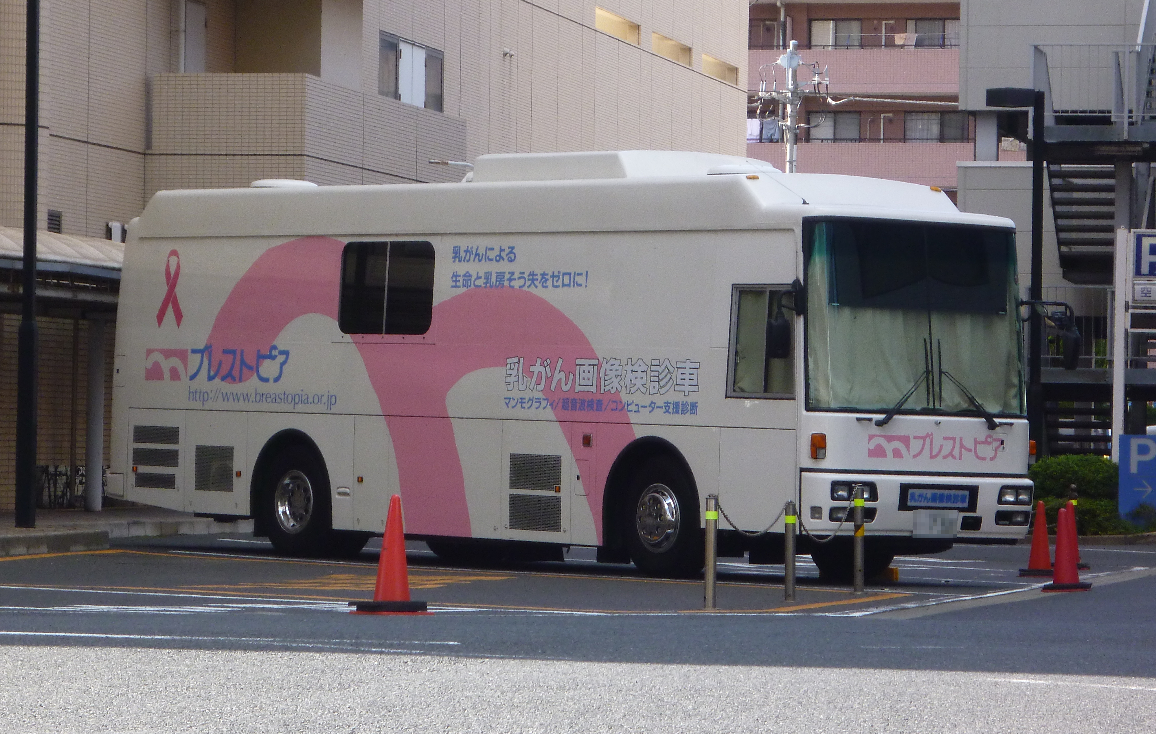 医療法人ブレストピア マンモグラフィ・超音波装置搭載バス「マンモバス」